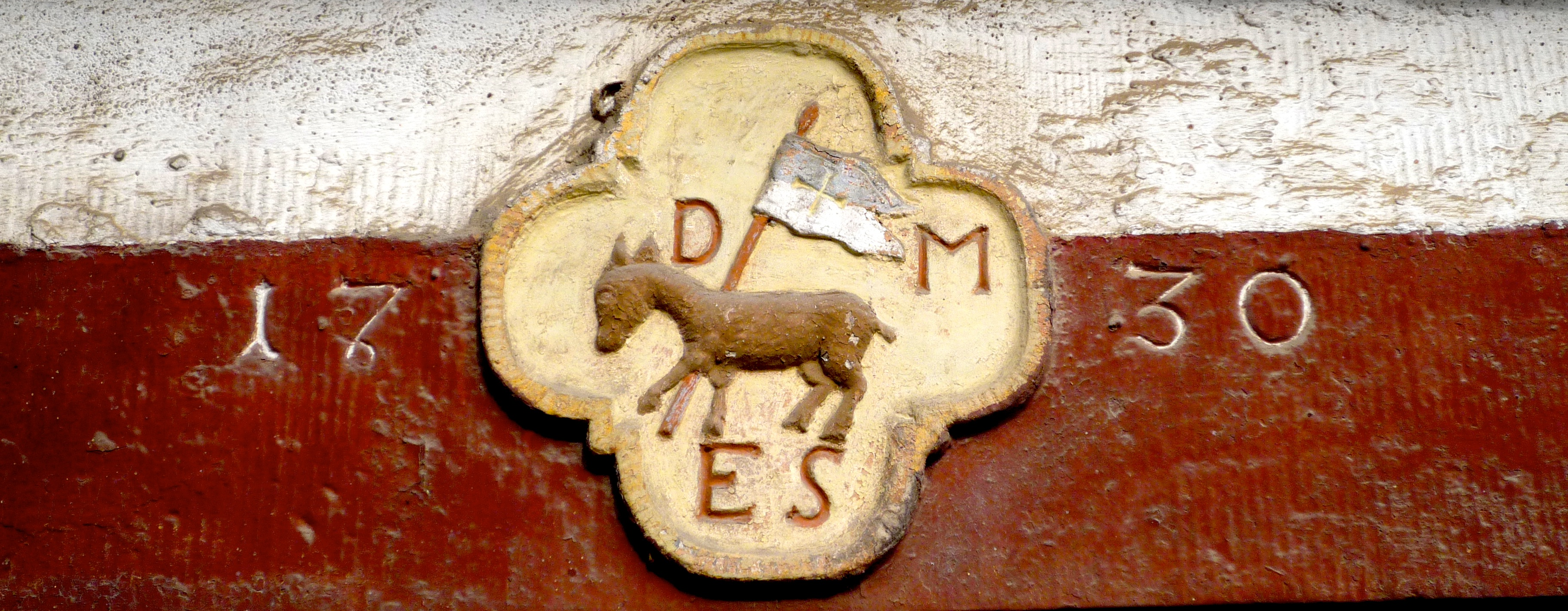 Wasselonne. Linteau de porte à l’agneau, 1730.